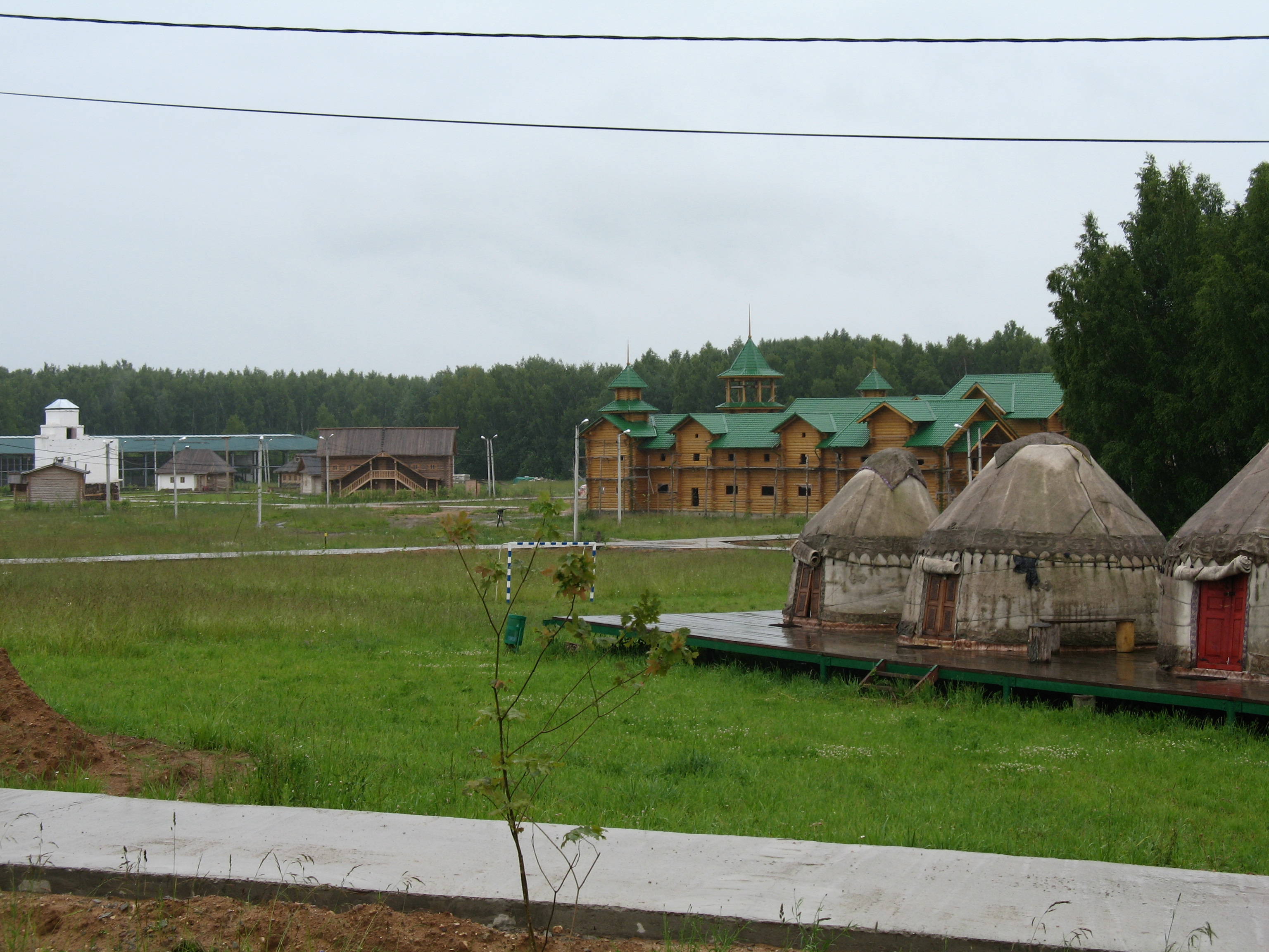 Этнографический парк «Этномир»